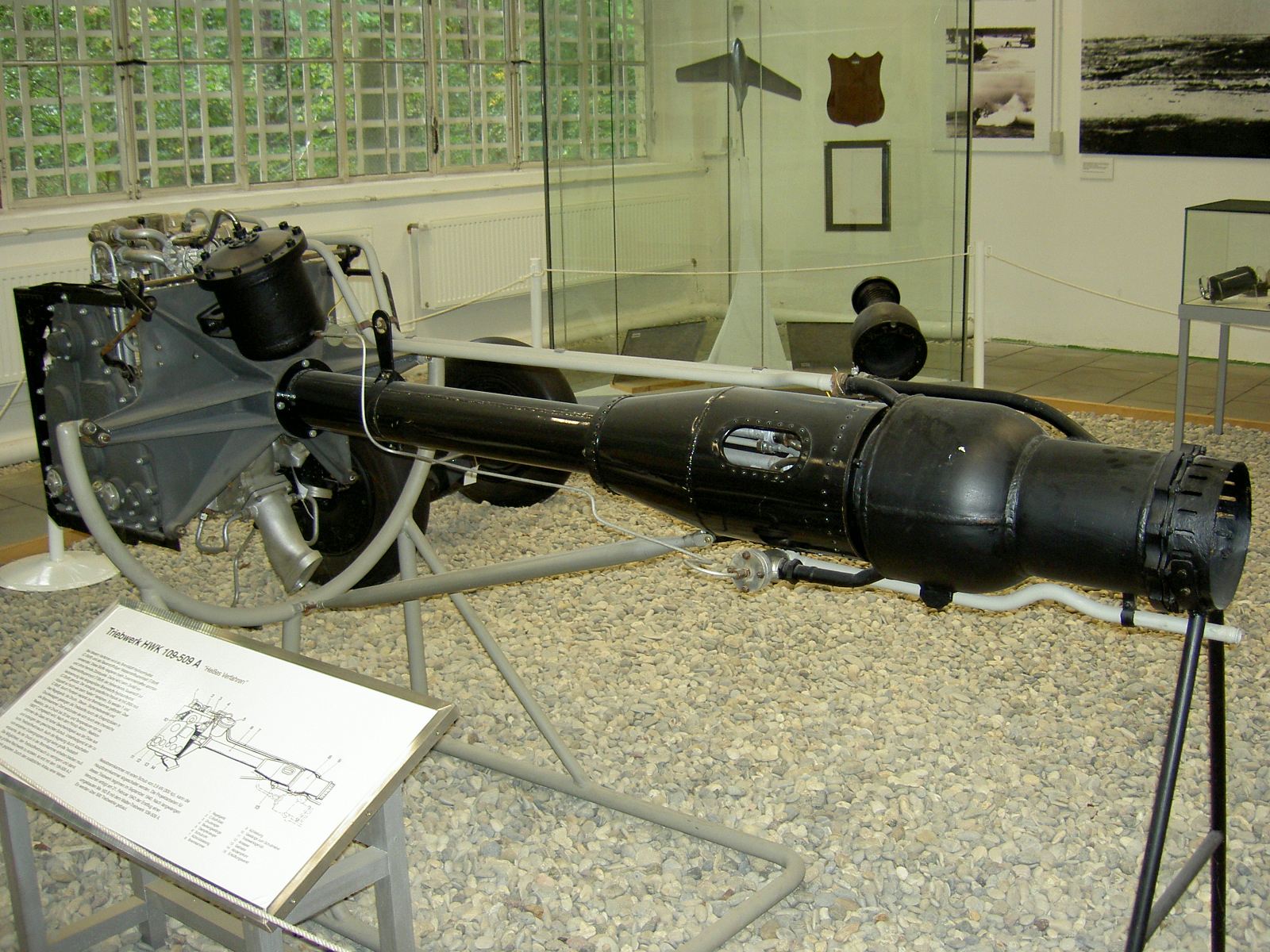 Walter Triebwerk HWK109-509 A im Luftwaffenmuseum Berlin-Gatow